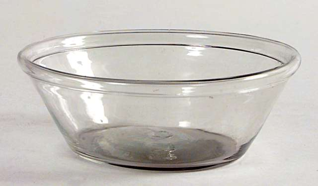 Melkeringe av klart glass. Antakelig fra slutten av 1800- eller begynnelsen av 1900-tallet. Diam. 13,3 cm. Foto Anne-Lise Reinsfelt / Norsk Folkemuseum. NF.1958-0154.